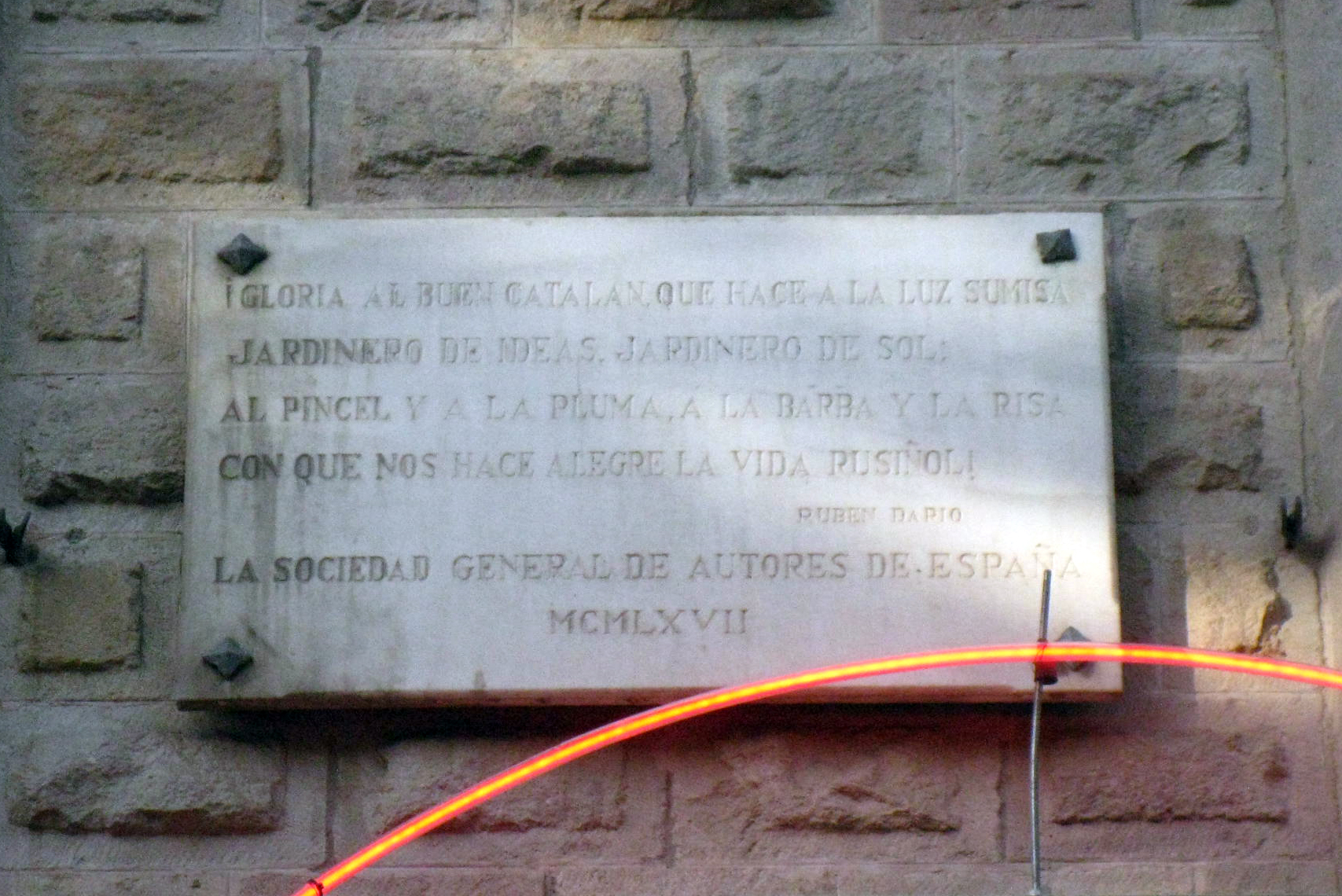 Santiago Rusiñol. Pg. de Gràcia, 96 (Barcelona)